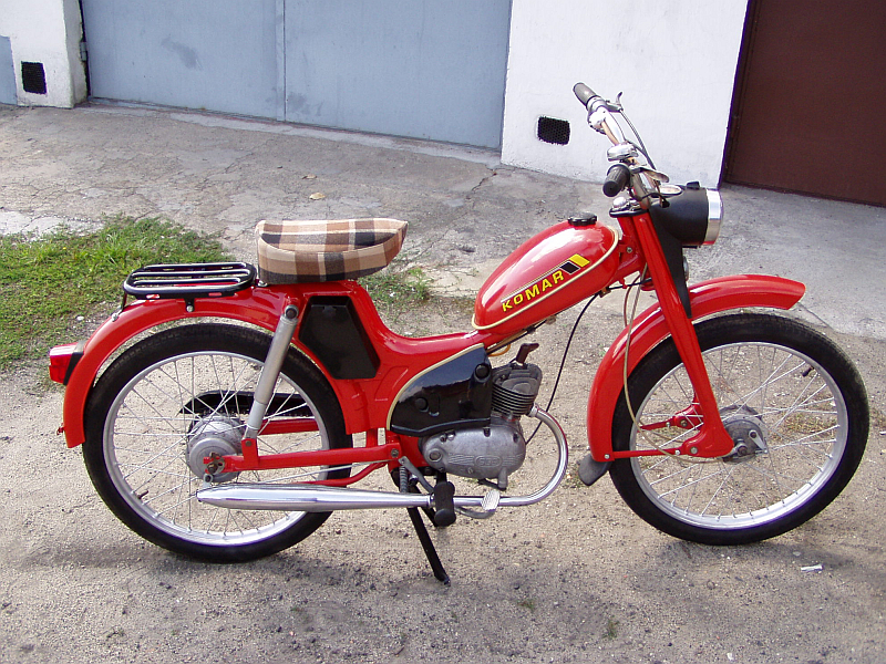 Motorower Romet Komar 2350